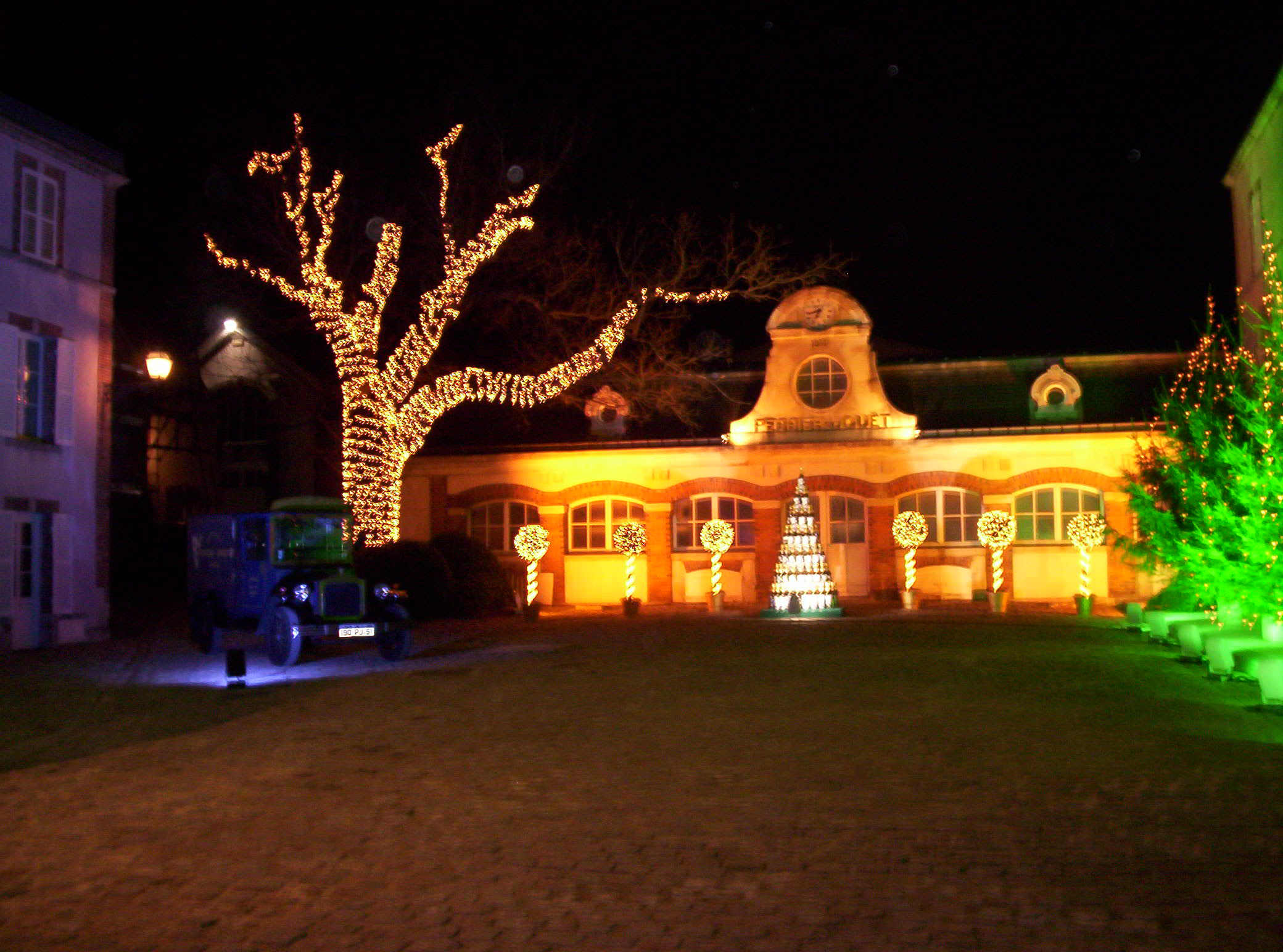 Manifestation Habits de Lumière 2007 sur l'avenue de Champagne à Épernay - Champagne Perrier-Jouët